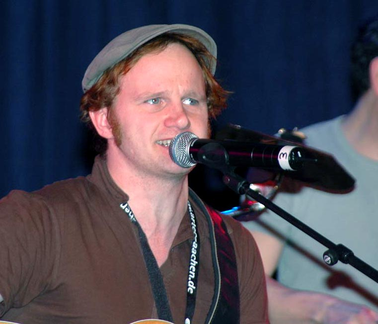 Christian Näthe beim Auftritt mit HASENSCHEISSE auf der Freiburger Kulturbörse 2009